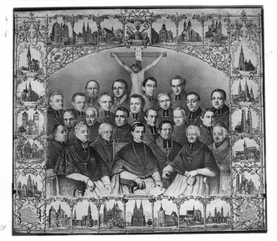 Gedenkbild der ersten deutschen Bischofskonferenz in Würzburg 1848: Bischöfe und Kathedralen